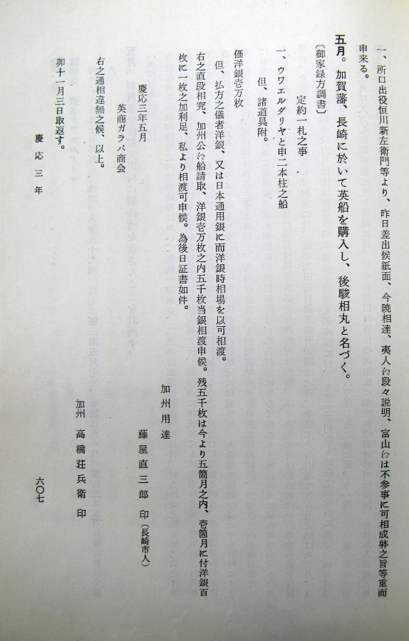 加賀藩軍艦産物方 髙橋荘兵衛 慶応3年、長崎グラバー商会より英船ウワエハダリヤ号 購入内容